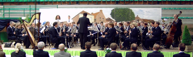 Description Harmonie St.Cecilia Grevenbicht-Papenhoven tijdens het Maasgouwtoernooi 2004 DateJune 2004Source Smeets-NiessenPermission (Reusing this file) Toestemming voor publicatie op Wikipedia Harmonie St.Cecilia Grevenbicht-Papenhoven tijdens het Maasgouwtoernooi 2004